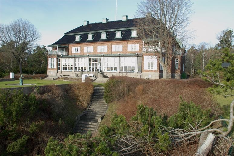 Nybyggnadsår 1913--15. Arkitekt Torben Grut. Motiv: Berga slott Nyckelord: Byggnadsminnen:Statl Kategori: SlottNybyggnadsår 1913--15. Arkitekt Torben Grut.